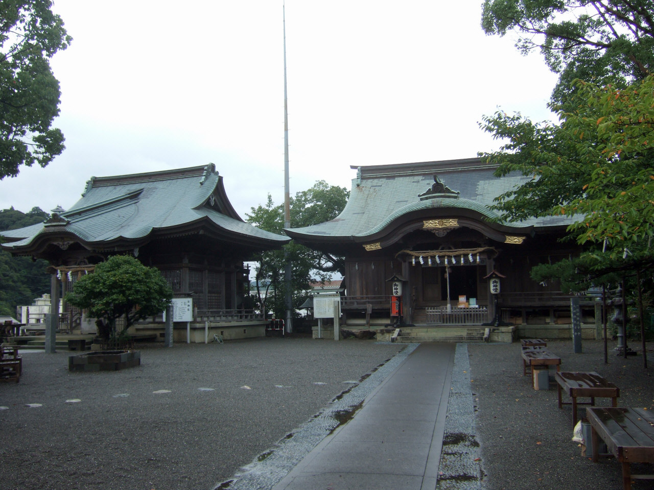 一條神社社殿（高知県四万十市） 左は天神社